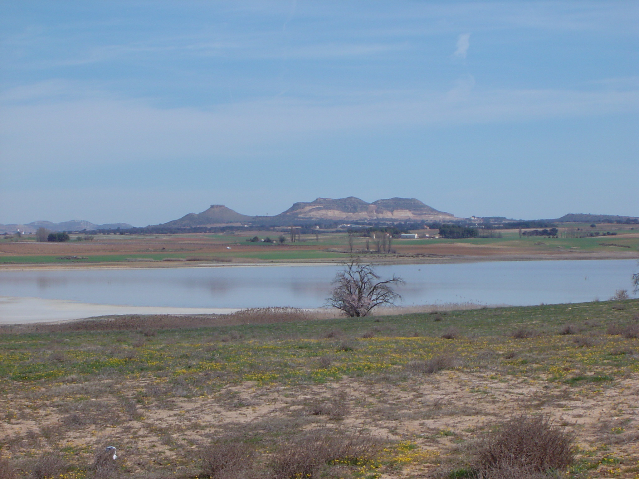 Laguna salada de Pétrola, en Pétrola, provincia de Albacete (España).